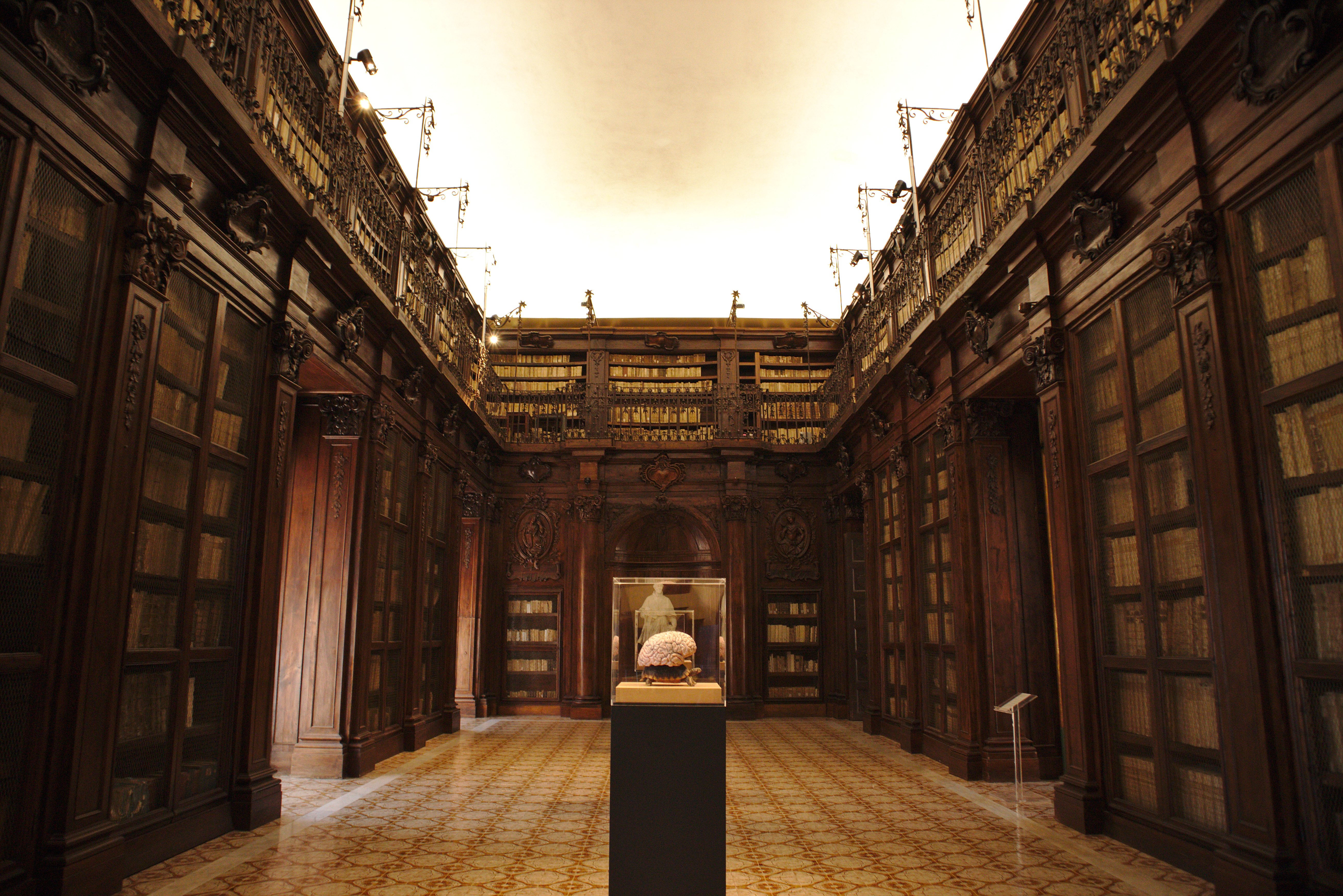 Interni della Biblioteca Lucchesiana di Agrigento.